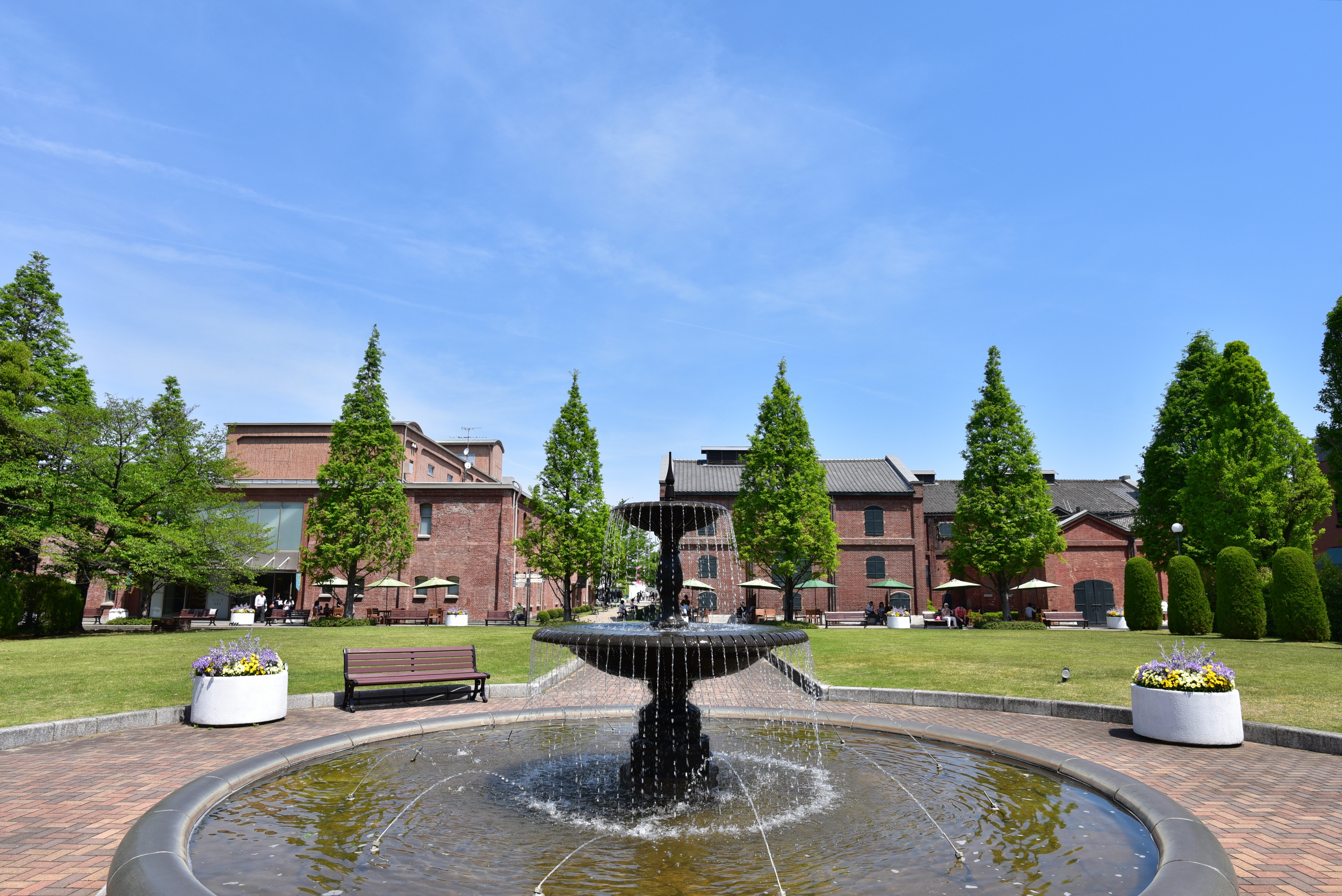 ノリタケの森